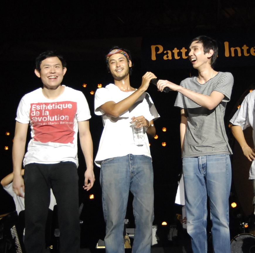 Saliva Bastards at Pattaya Music Festival 2007